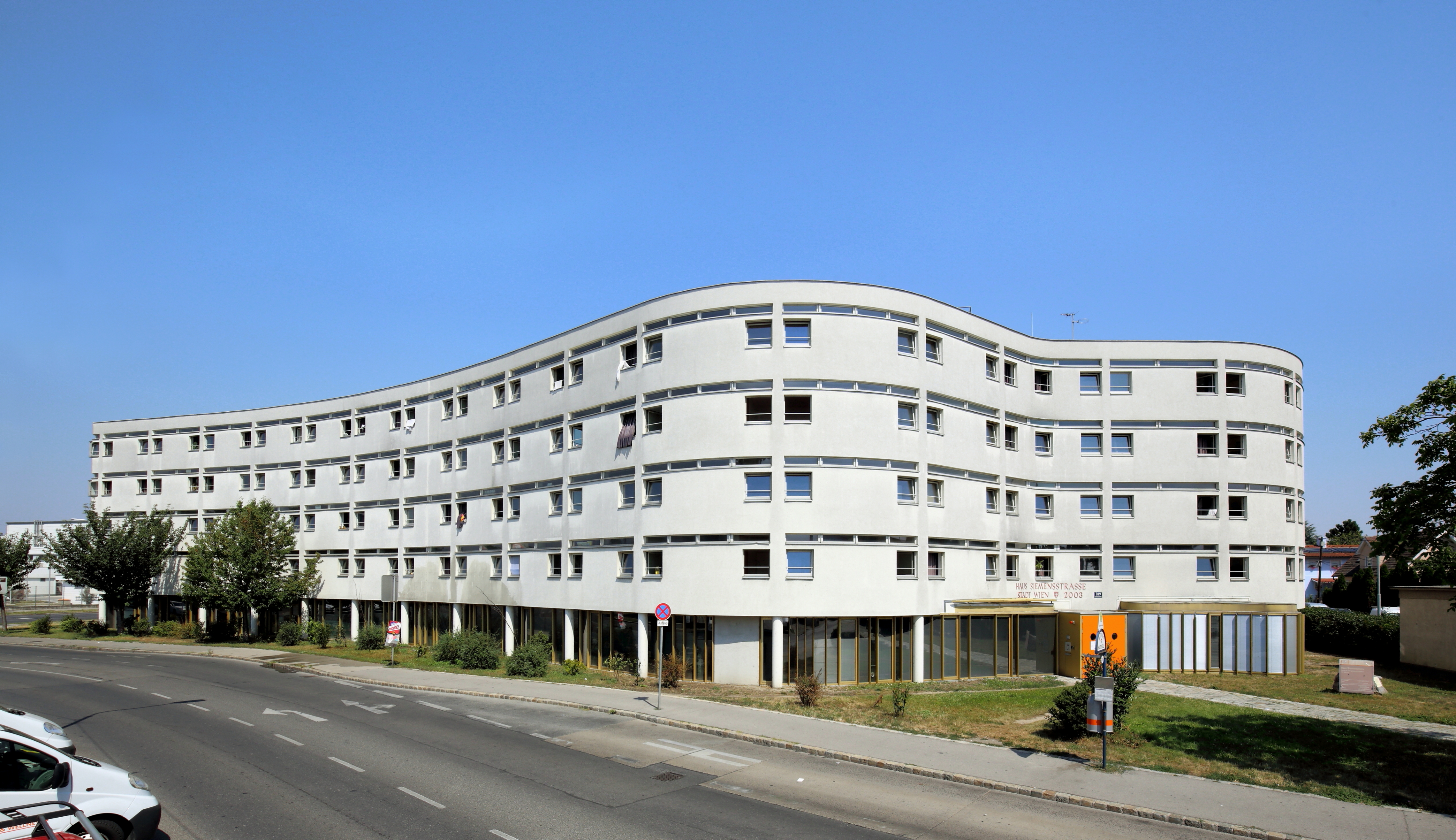 Das Obdachlosenheim (Übergangswohnhaus für wohnungslose Männer) Haus Siemensstraße im 21. Wiener Gemeindebezirk Floridsdorf.Das Gebäude, als Ersatz für das Männerwohnheim Meldemannstraße, wurde Anfang der 2000er Jahre nach Plänen der Architekten Gruss & Gruss errichtet, im Jahr 2003 in Betrieb genommen und 2004 offiziell eröffnet.